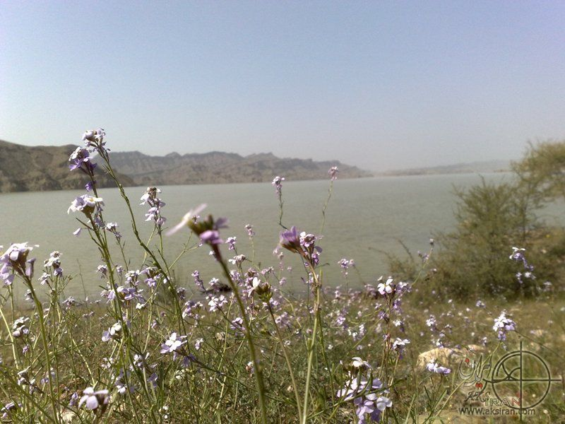 دریاچه سد میناب